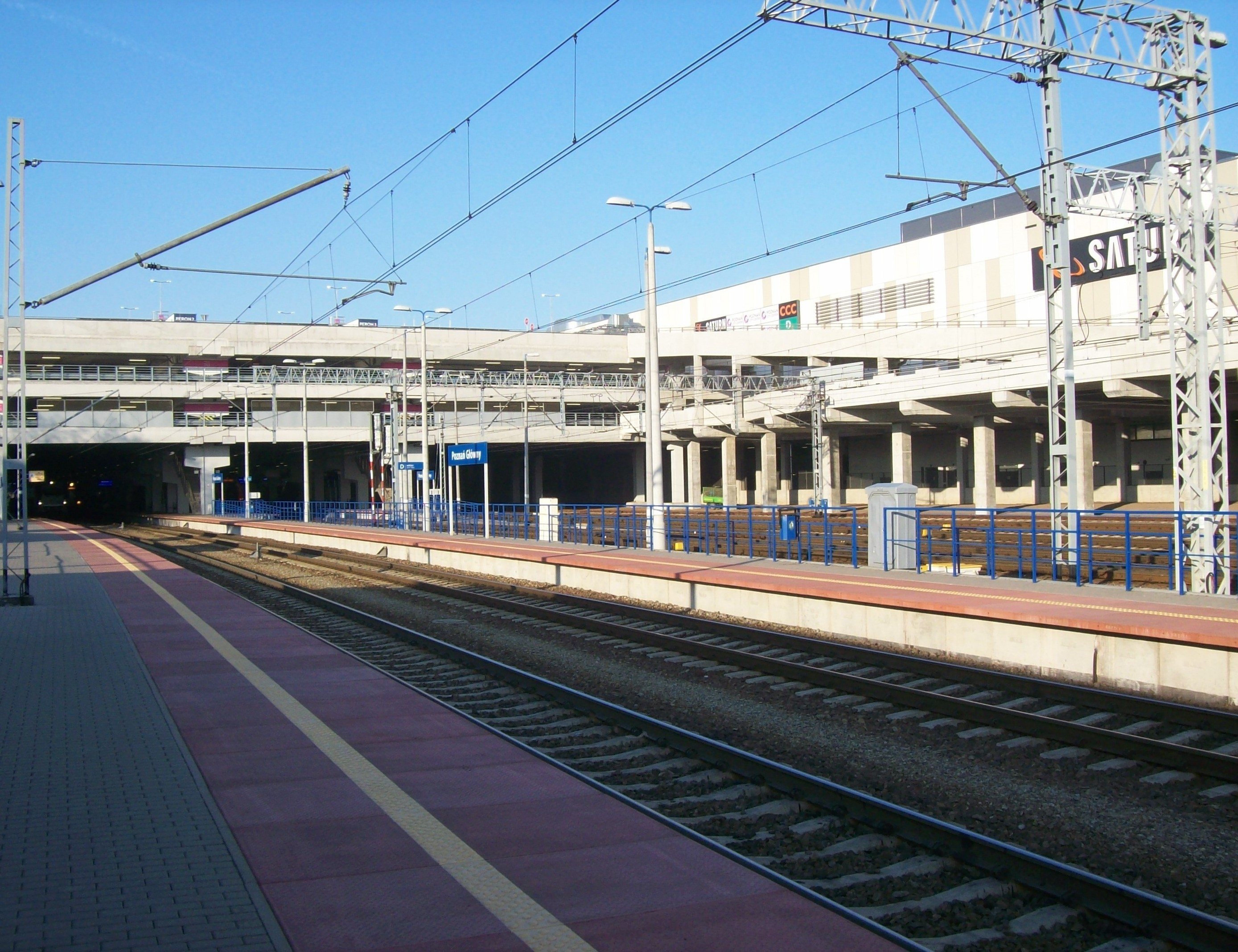 Perony 1-3 na stacji Poznań Główny